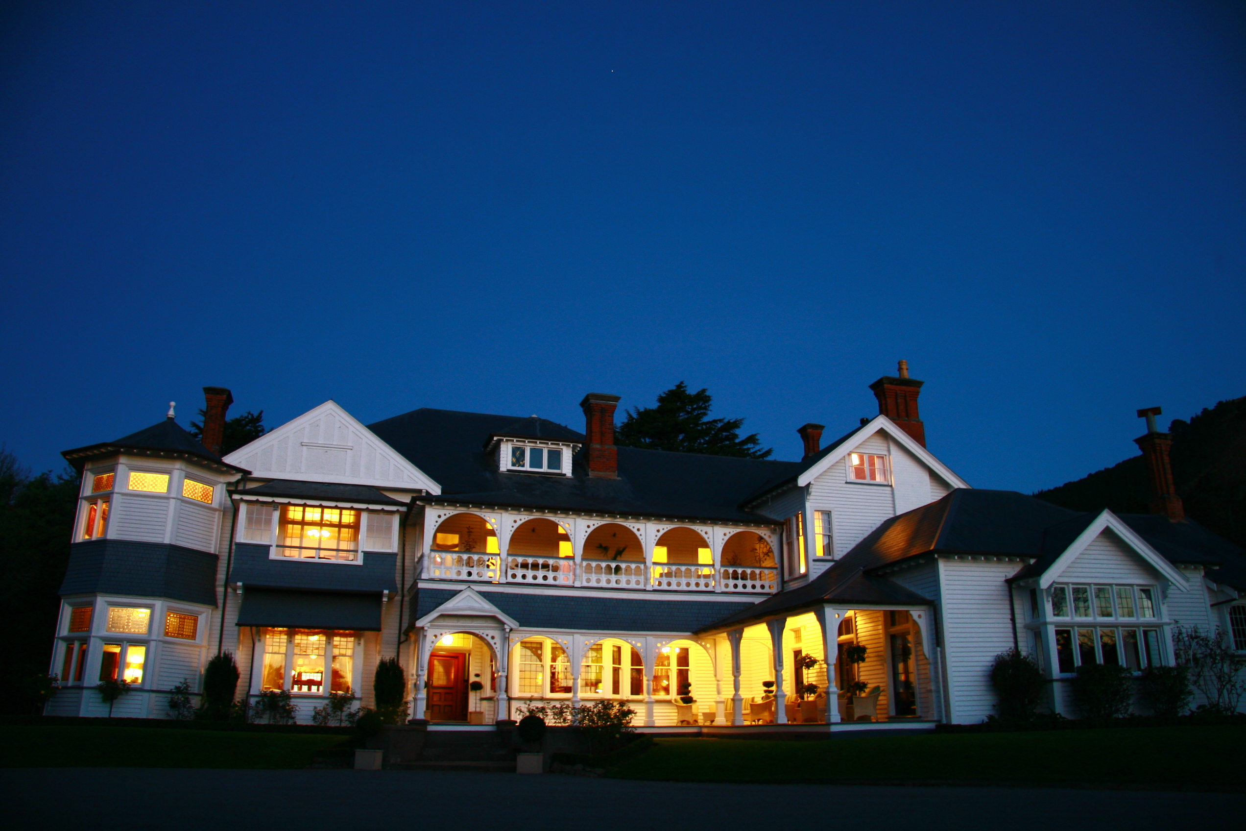 Otahuna in May 2007.